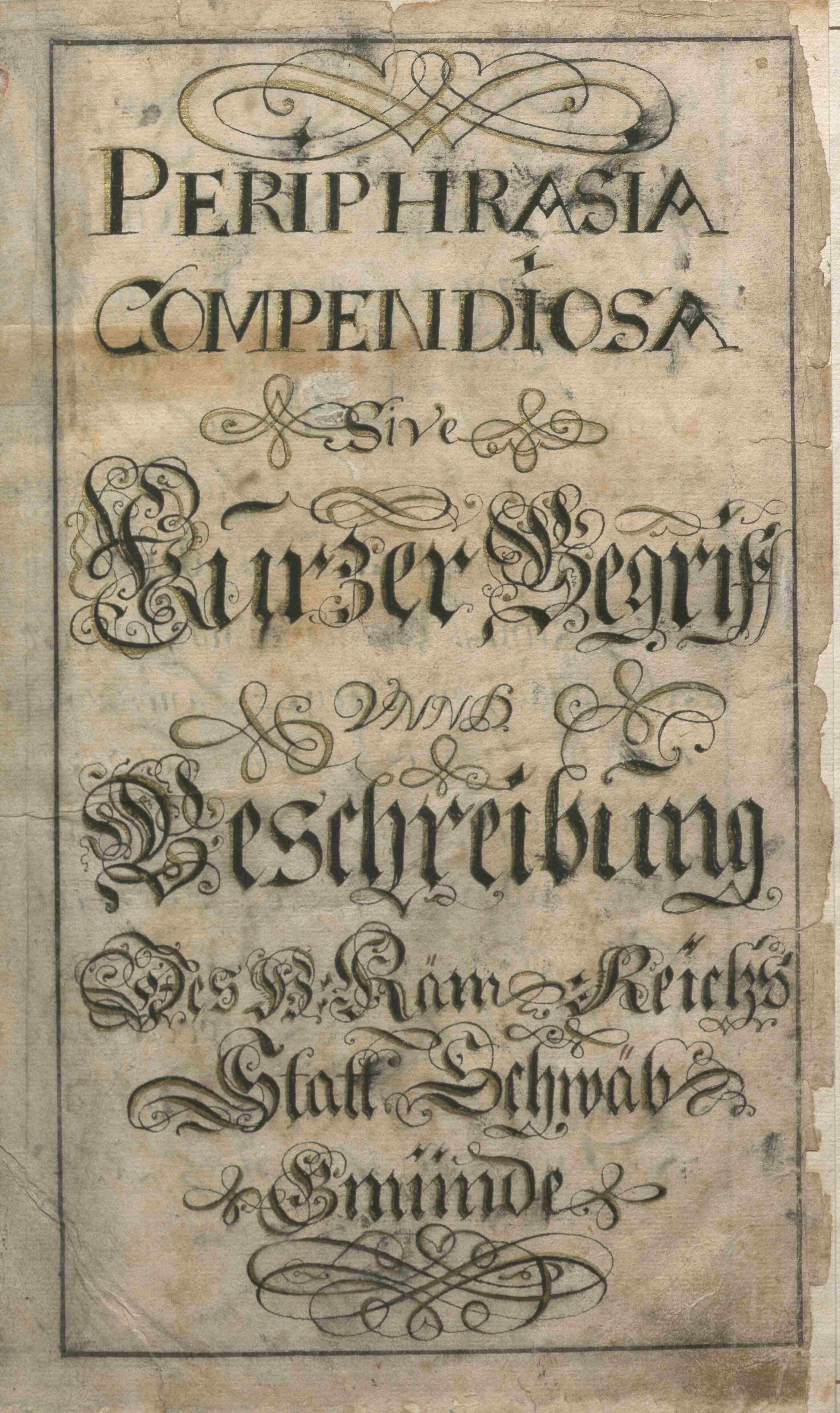 Titelblatt der Periphrasia Compendiosa